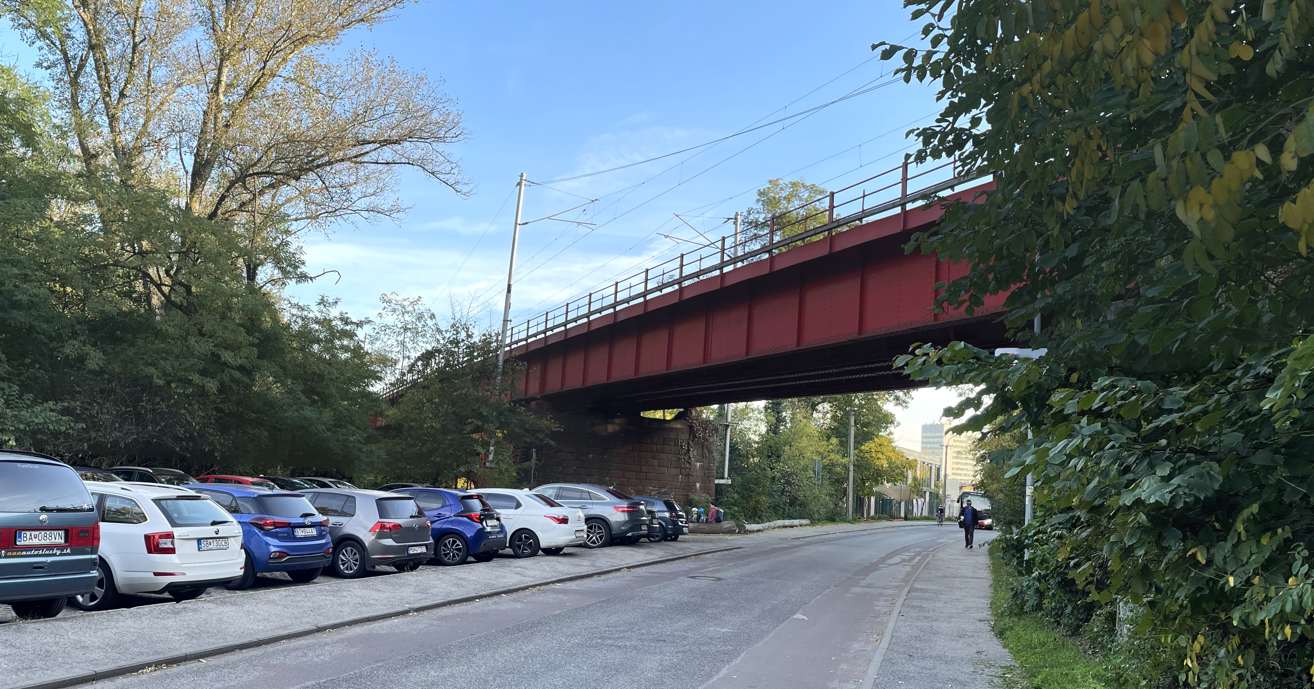 Celkový pohľad na Červený most